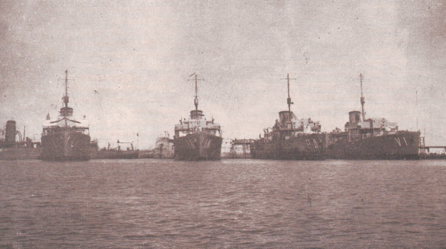 Cuatro corbetas clase flower de la Fuerza Naval Venezolana, "Libertad", "Independencia", "Patria" y "Victoria" en 1948 en el muelle de Puerto Cabello